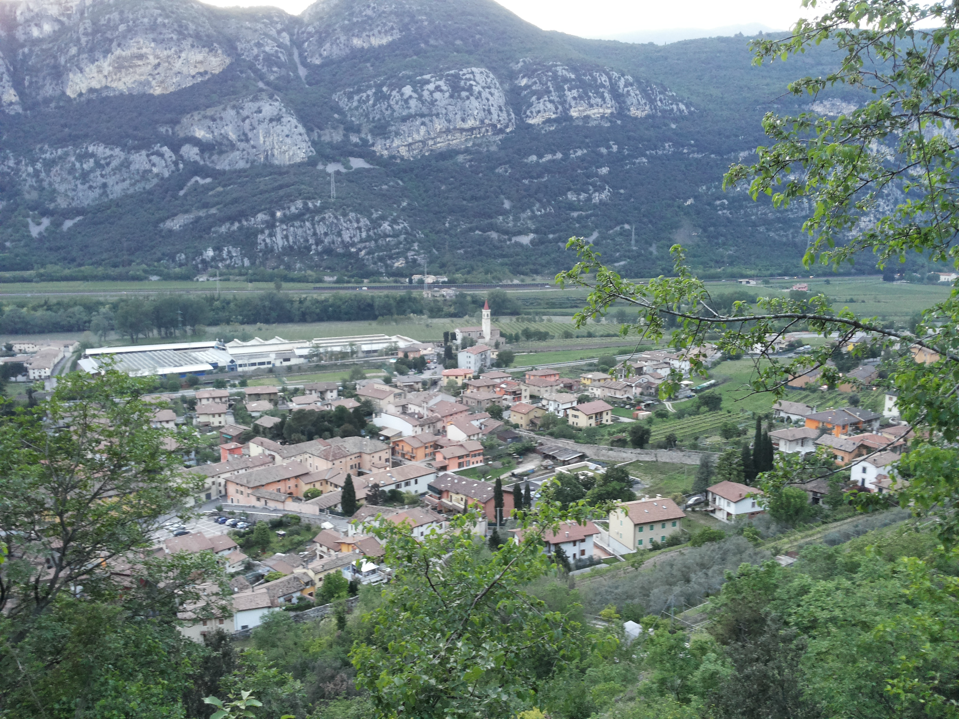 Panorama di Dolcè (provincia di verona)